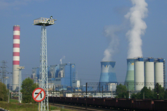 PGE Elektrownia Opole S.A. - widok z trasy 454